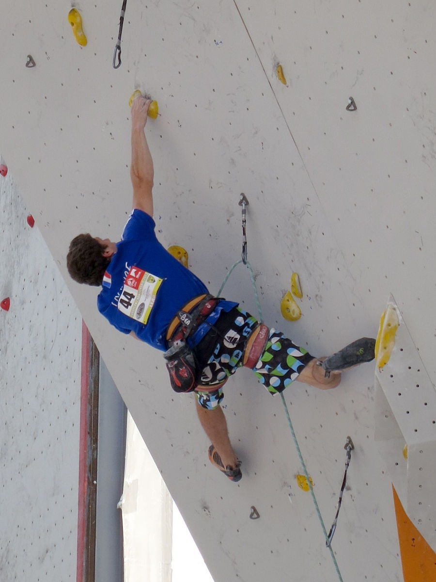 Gautier Supper en demi-finale du championnat d'Europe d'escalade (difficulté) 2013 à Chamonix